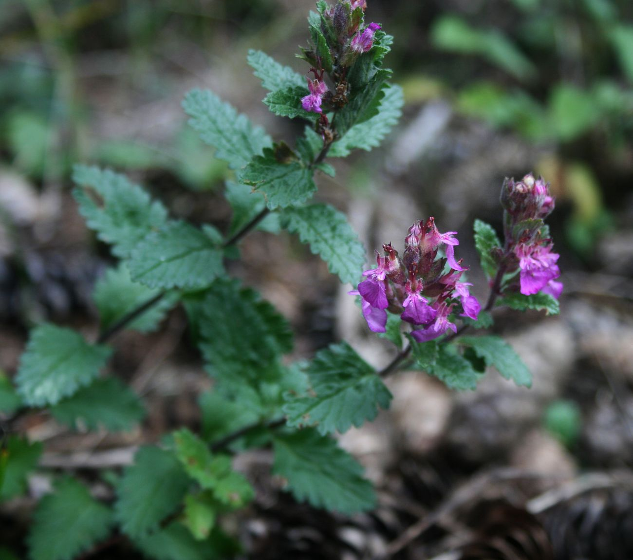 Teucrium chamaedrys subsp. nuchense, Lippenblütler (Lamiaceae) – Georgien/საქართველო: Kleiner Kaukasus, zwischen Didi Mitarbi und Patara Mitarbi, ENE Bakuriani/ბაკურიანი, ca. 1410 m s.m.